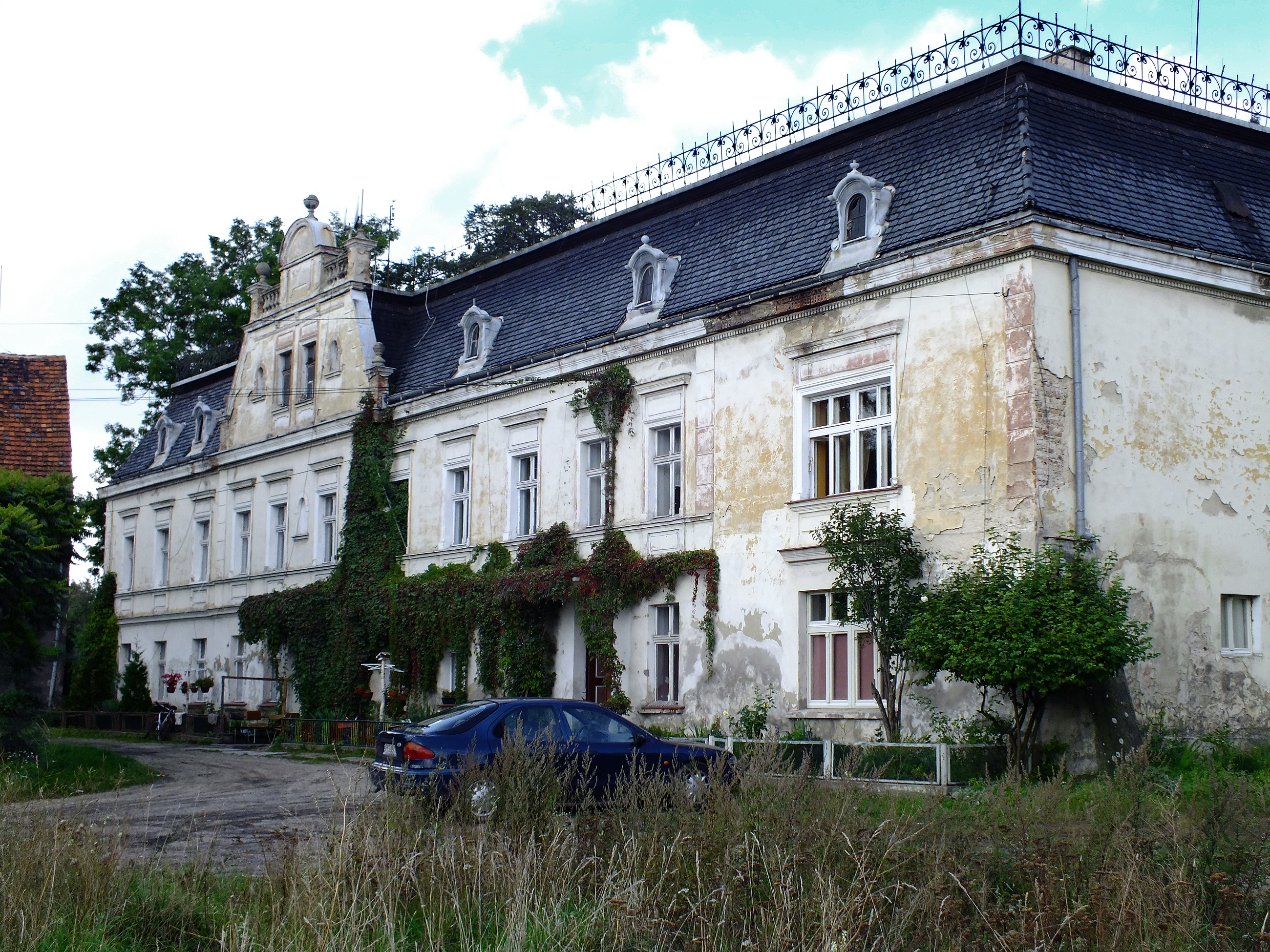 Witoszów Dolny 116 - pałac, po wojnie przejściowo PGR (zabytek nr rejestr. A/4619/1495/Wł z dn. 15.04.1996)